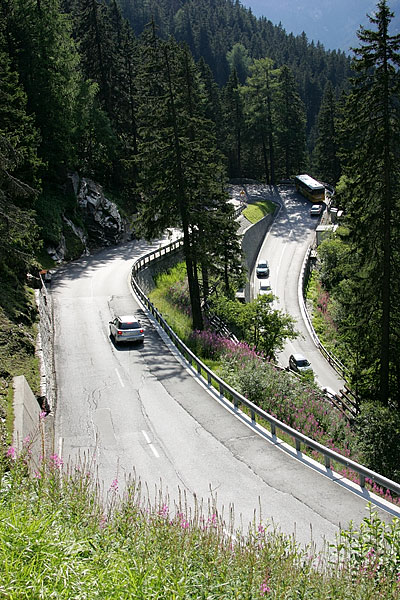 Malojapassstrasse